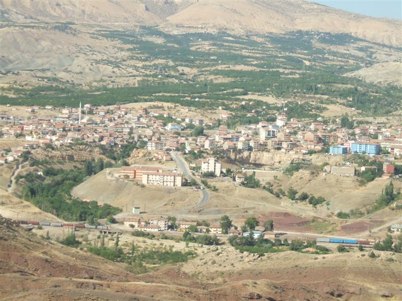 Hekimhan